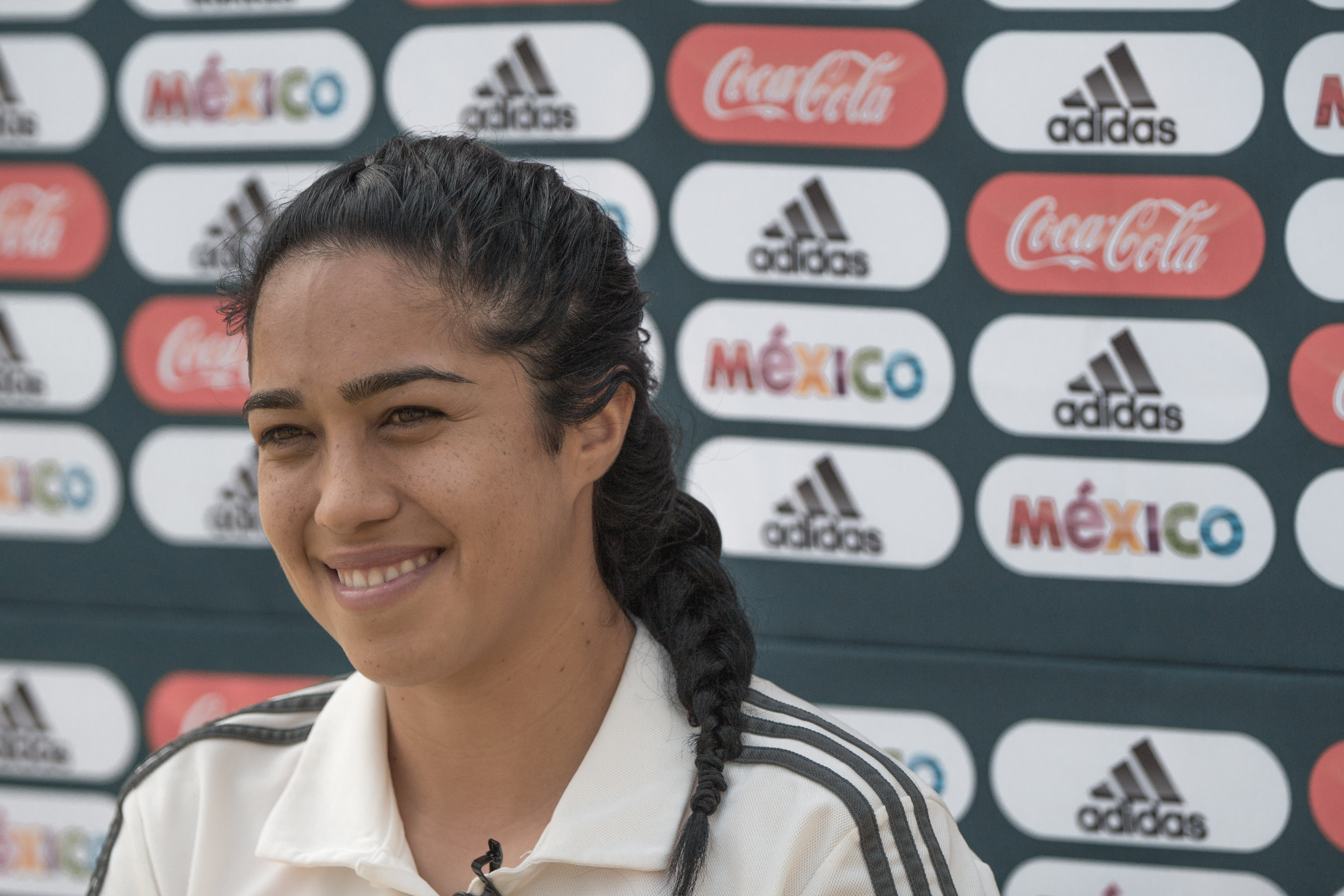 Renae Cuéllar, jugadora de futbol mexicana.